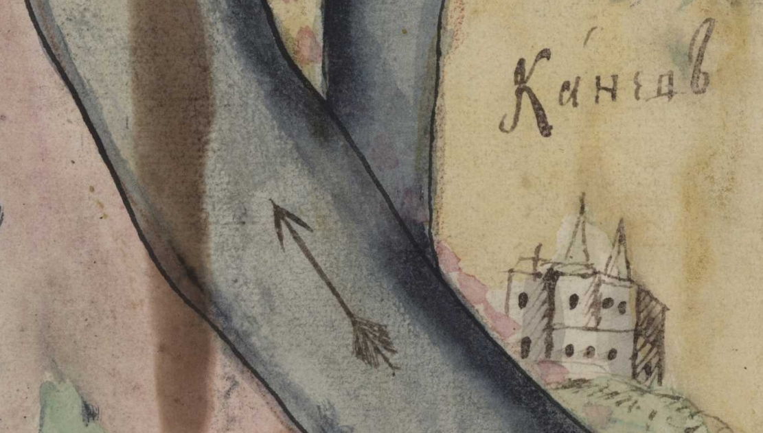 Фрагмент карти Київської губернії. XVIII століття. РГАДА, ф. 192, оп. 1, Киевская губ., № 5.